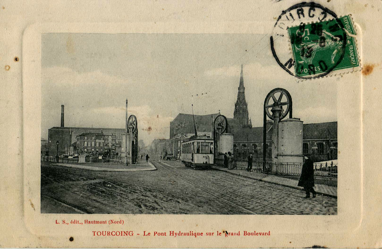 Carte postale ancienne éditée par L. S., éditeur à Hautmont (Nord):TOURCOING - Le Pont hydraulique sur le grand Boulevard